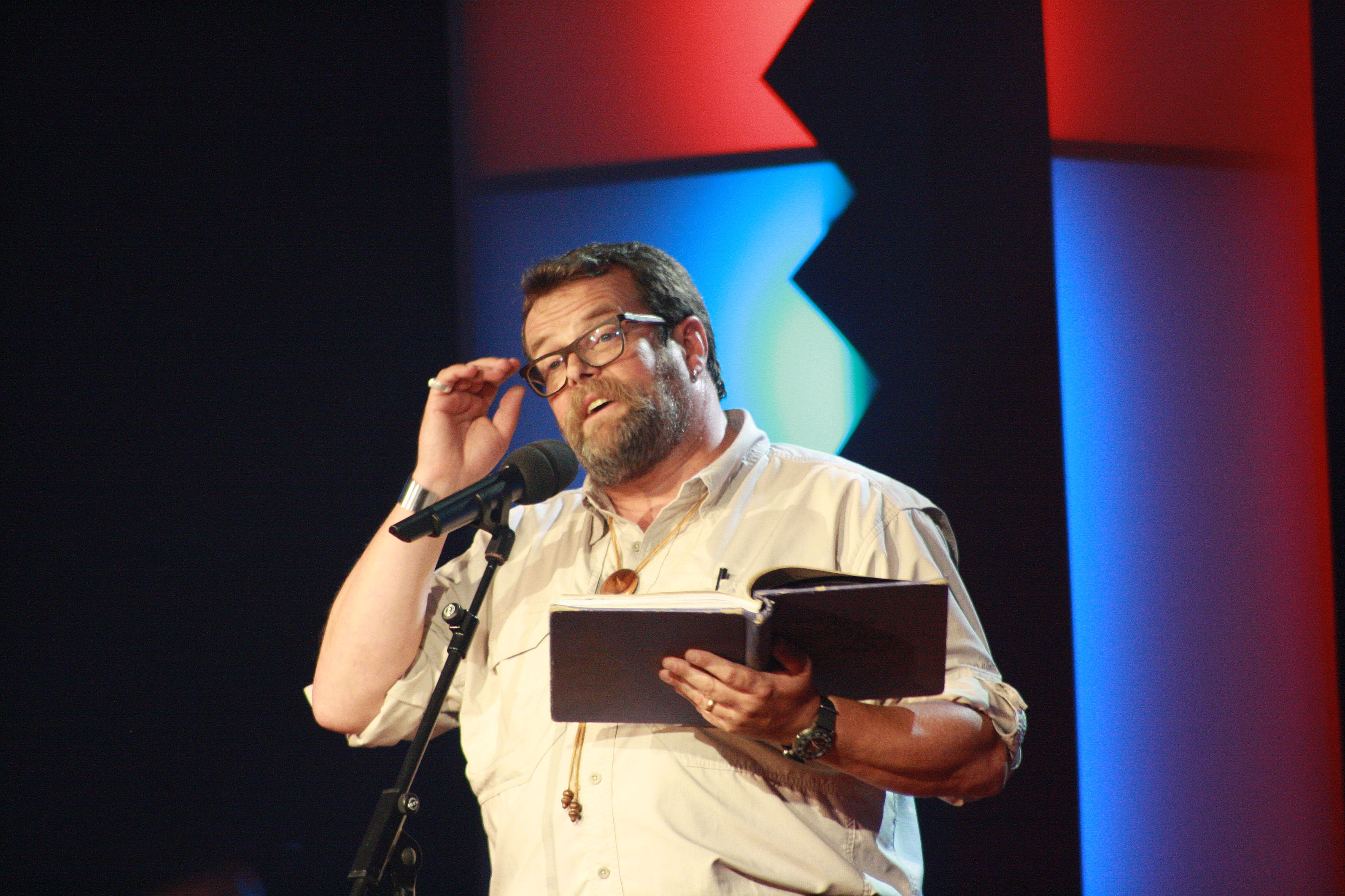 Auftritt bei der Prix Pantheon Gala 2013, Brückenforum, Bonn.